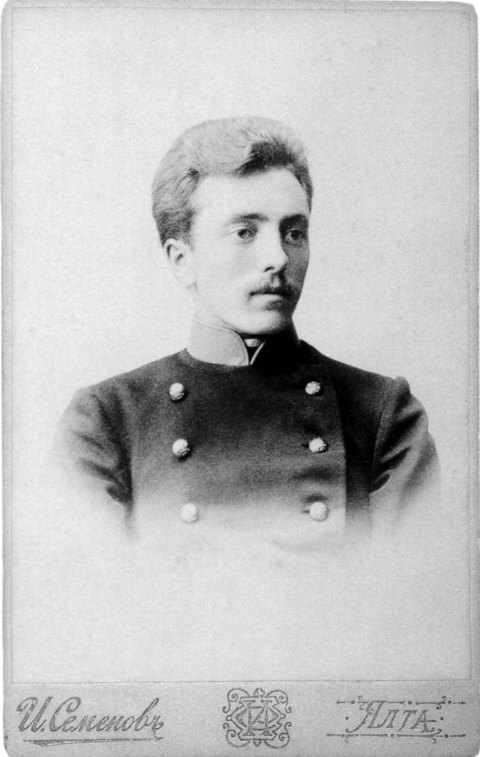 Povilas Višinskis